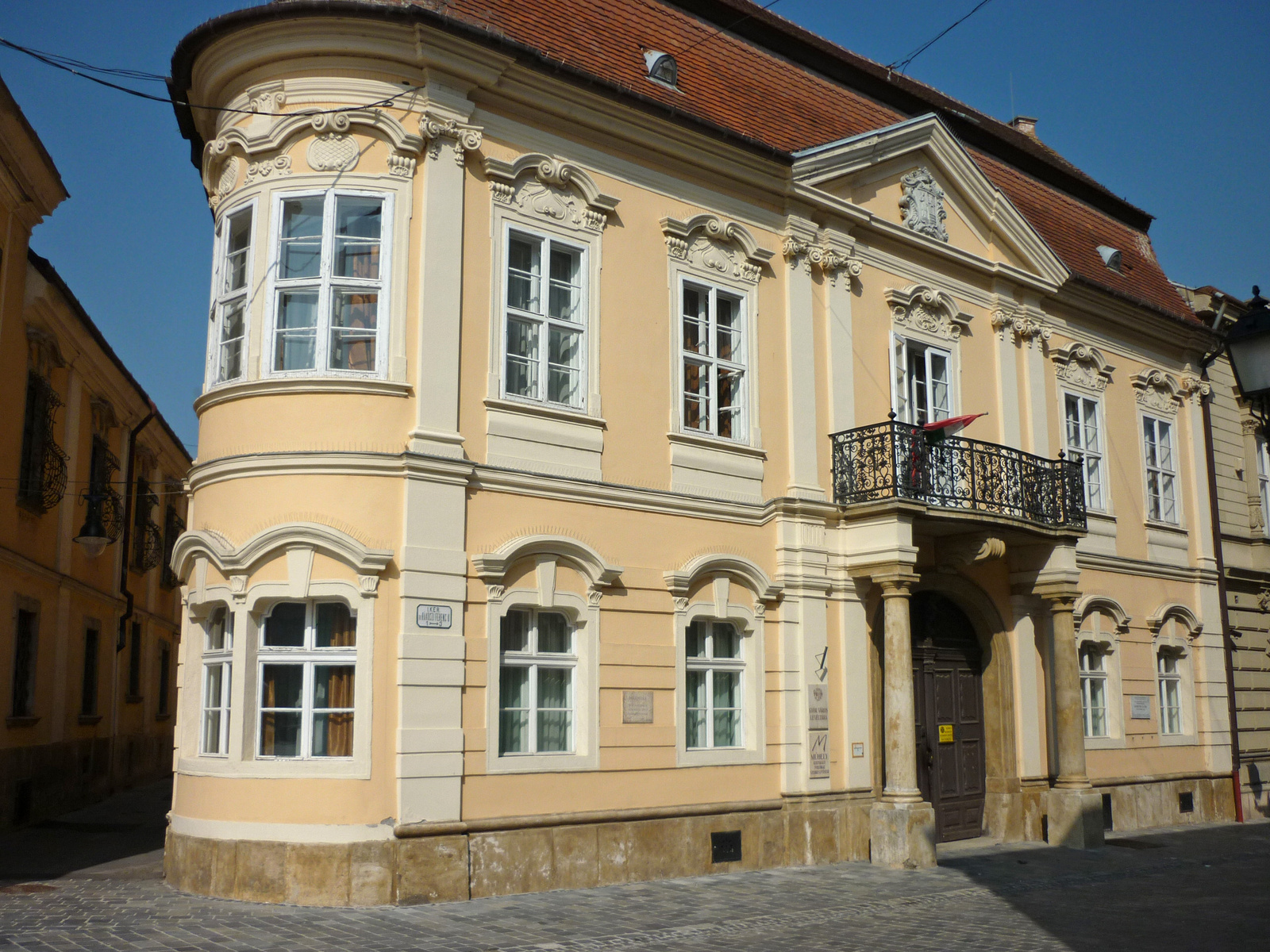 Lakóház, Ún. Régi Városháza (Győr, Rákóczi Ferenc út 1.)